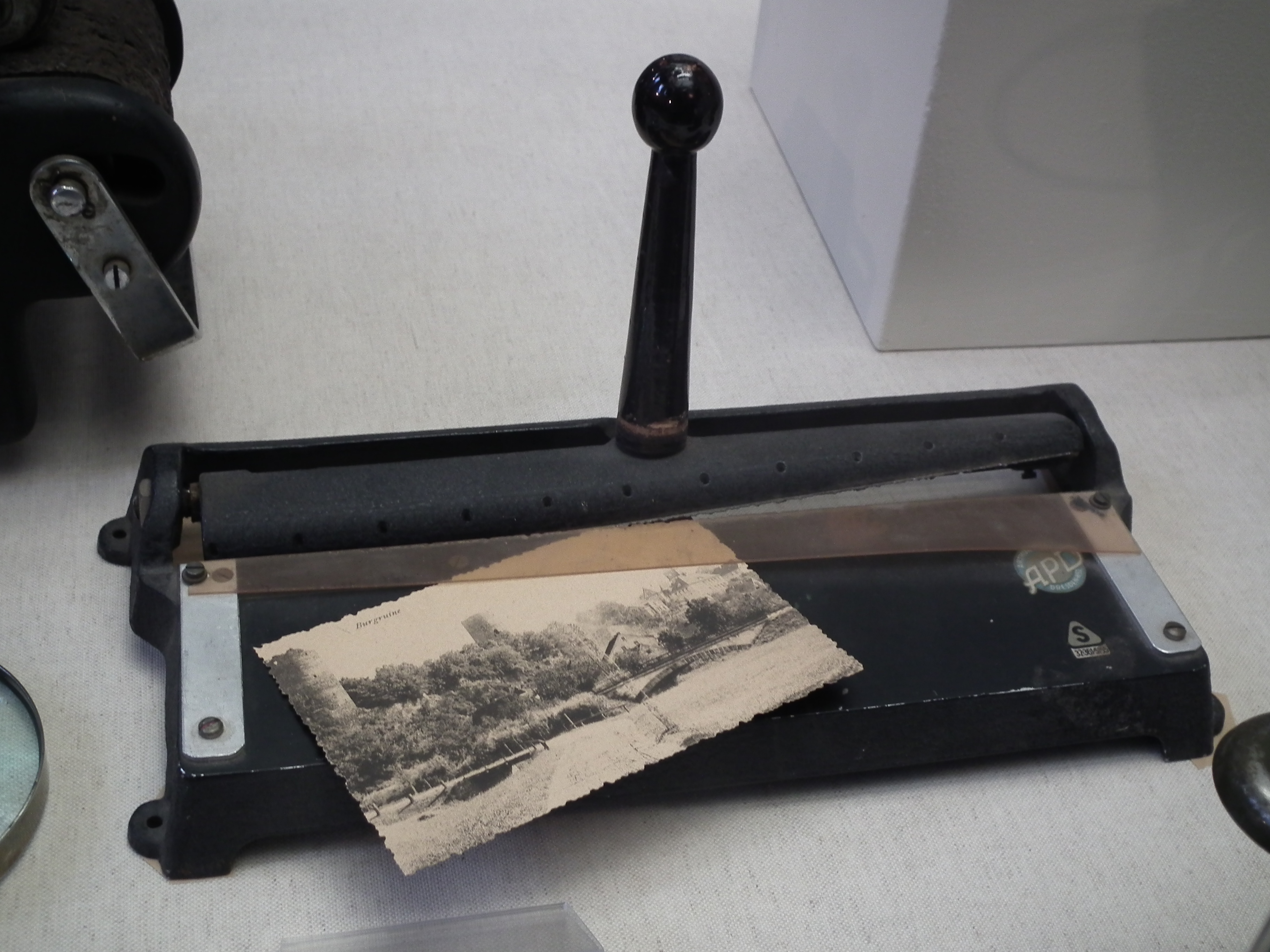 Stadtmuseum Meißen, Sonderausstellung "Als Papier noch Luxus war. 225 Jahre Brück & Sohn in Meißen"